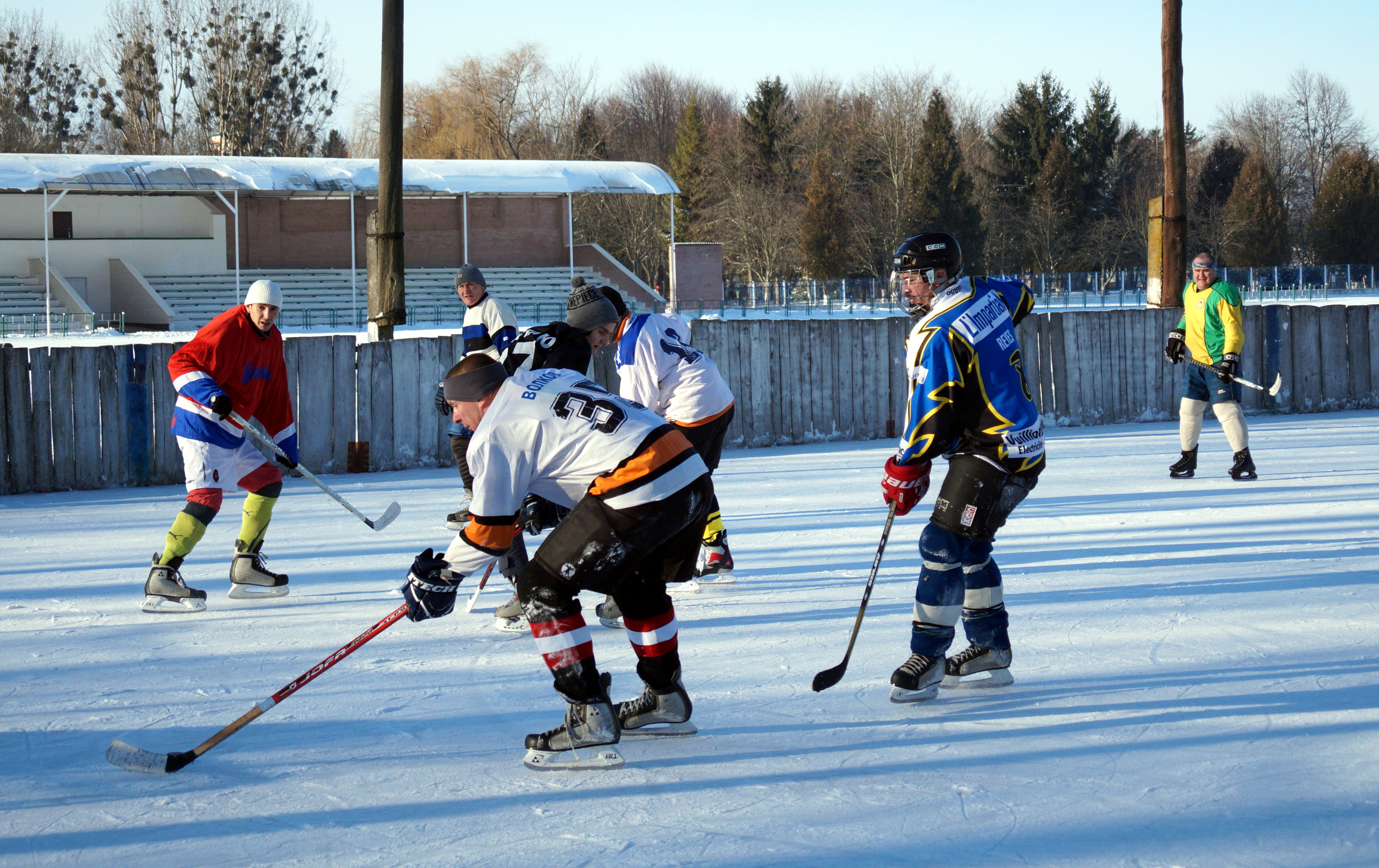 Mlynivs'kyi district, Rivnens'ka oblast, Ukraine